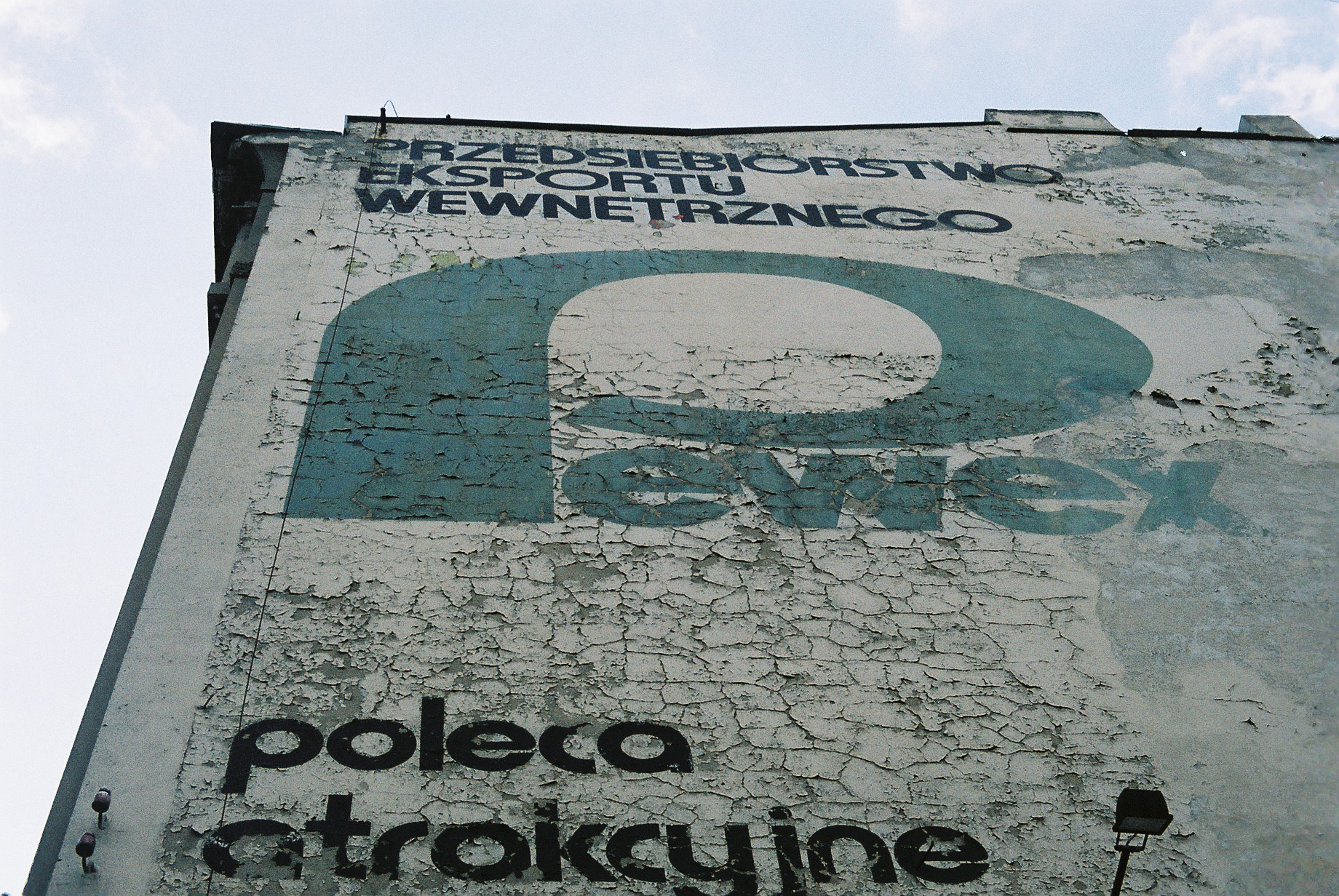 Reklama Pewexu na Wydziale Filologicznym UŁ, ul. Sienkiewicza 21 w Łodzi